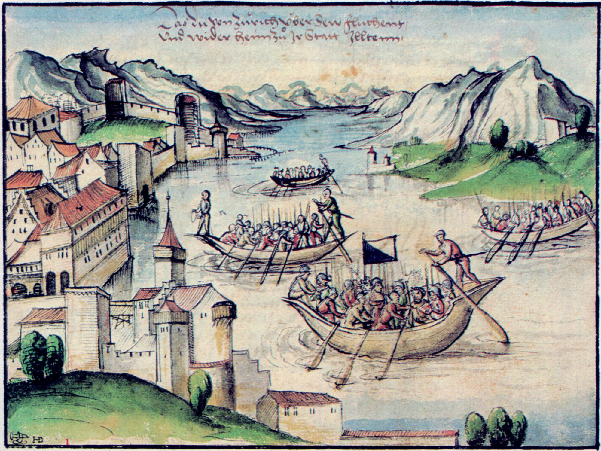 Nach dem Misserfolg beim Angriff auf Pfäffikon SZ fliehen die Zürcher in Booten über den See nach Zürich. Während des Alten Zürcherkriegs, 1440 Eine wahrscheinliche Datierung zu dem Rückzug ist die Nacht vom 2. auf den 3. November 1440. Kronau schreibt dazu: „1440 ... 2. November ... Während der Nacht entwichen sie mit 52 Schiffen auf das rechte Seeufer.“ Literatur: Gerold Ludwig Meyer Von Knonau: Der Kanton Schwyz historisch, geographisch, statistisch geschildert, Band 5, Huber, St. Gallen & Bern, 1835, Seite 24